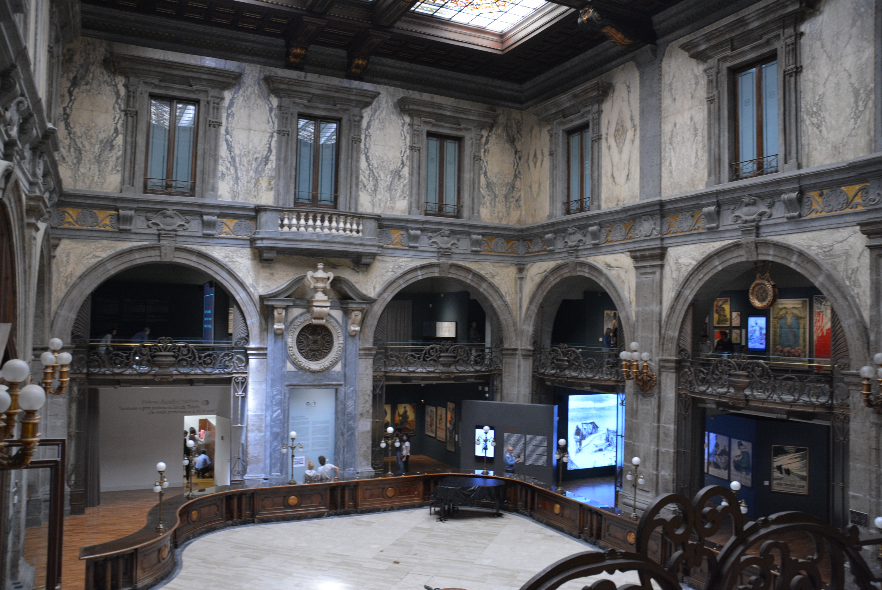 Palazzo Zevallos a Napoli